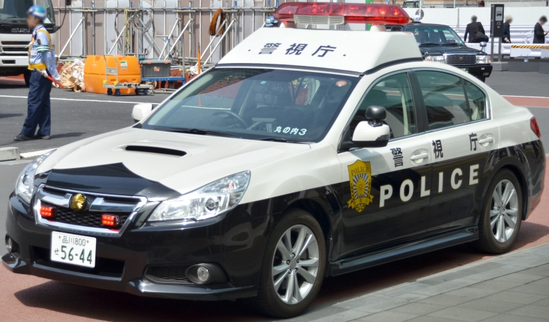 Subaru Legacy B4 police car